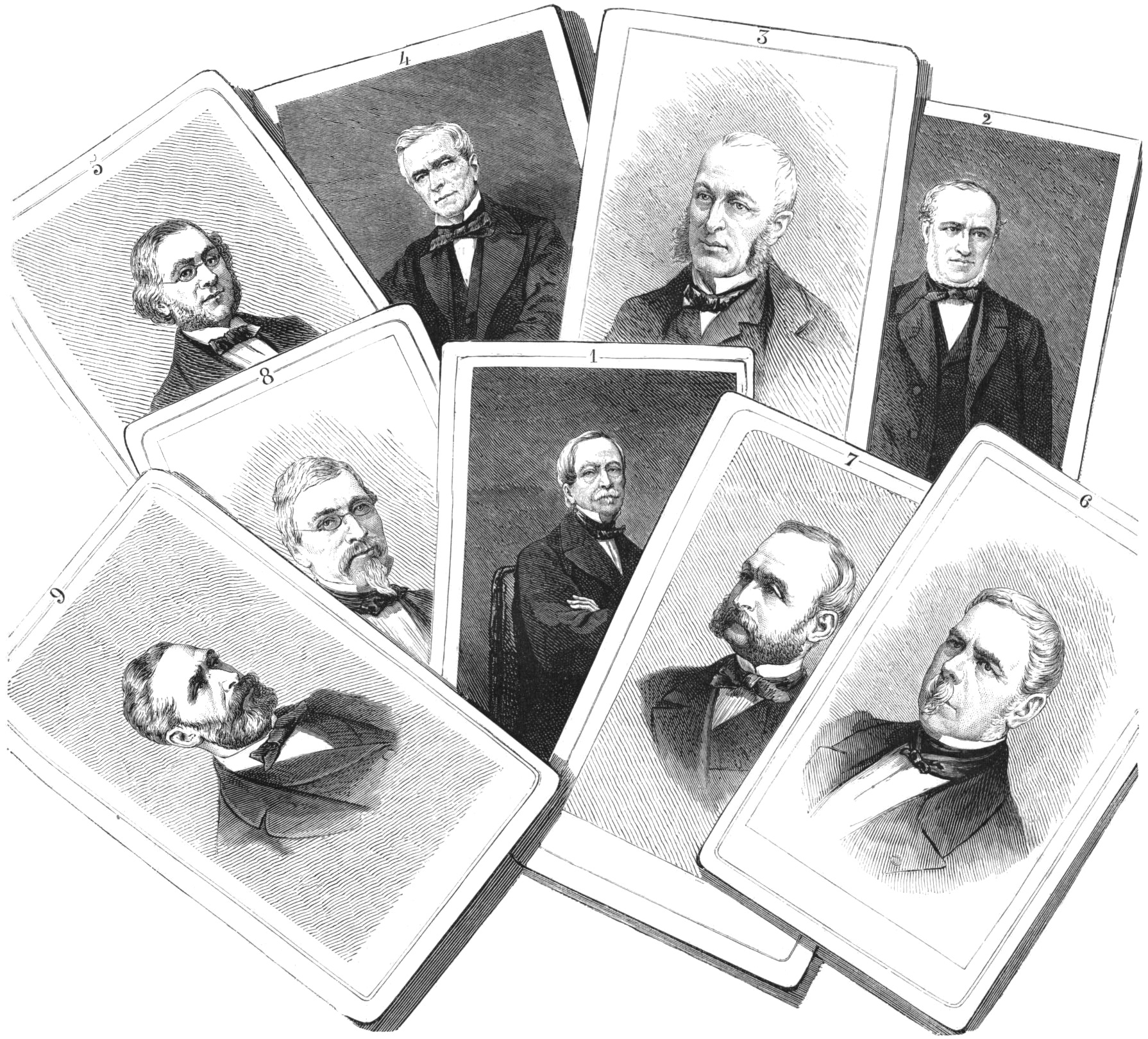 "Assemblée nationale. - La commission des Neuf." "1. Le général Changarnier. 2. M. Chesnelong. 3. Le duc d'Audiffret-Pasquier. 4. M. de Larcy. 5. M. Callet. 6. M. Daru. 7. M. de Labassetière. 8. M. Combier. 9. M. Lucien Brun."